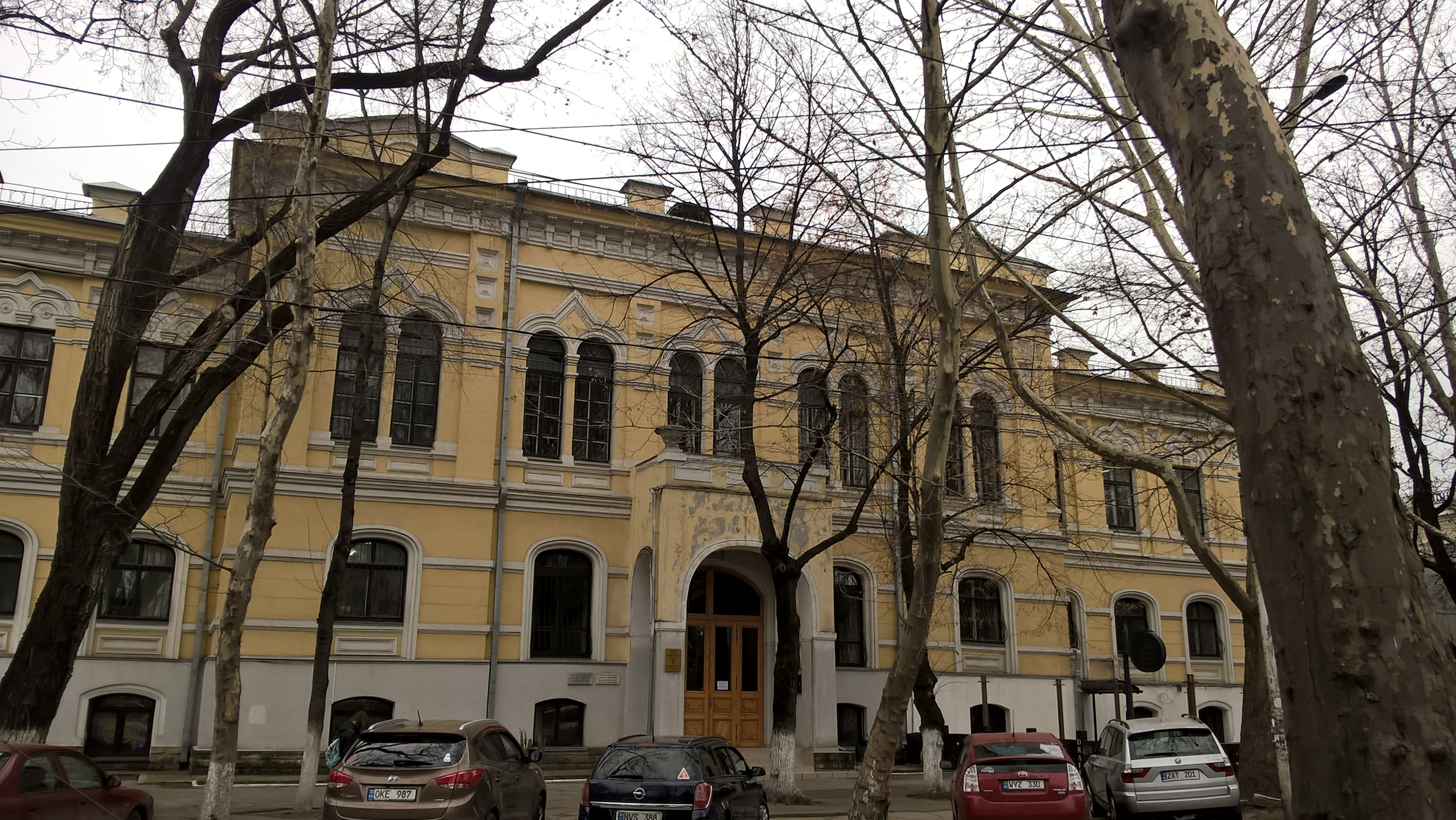 Dawne prawosławne seminarium duchowne w Kiszyniowie